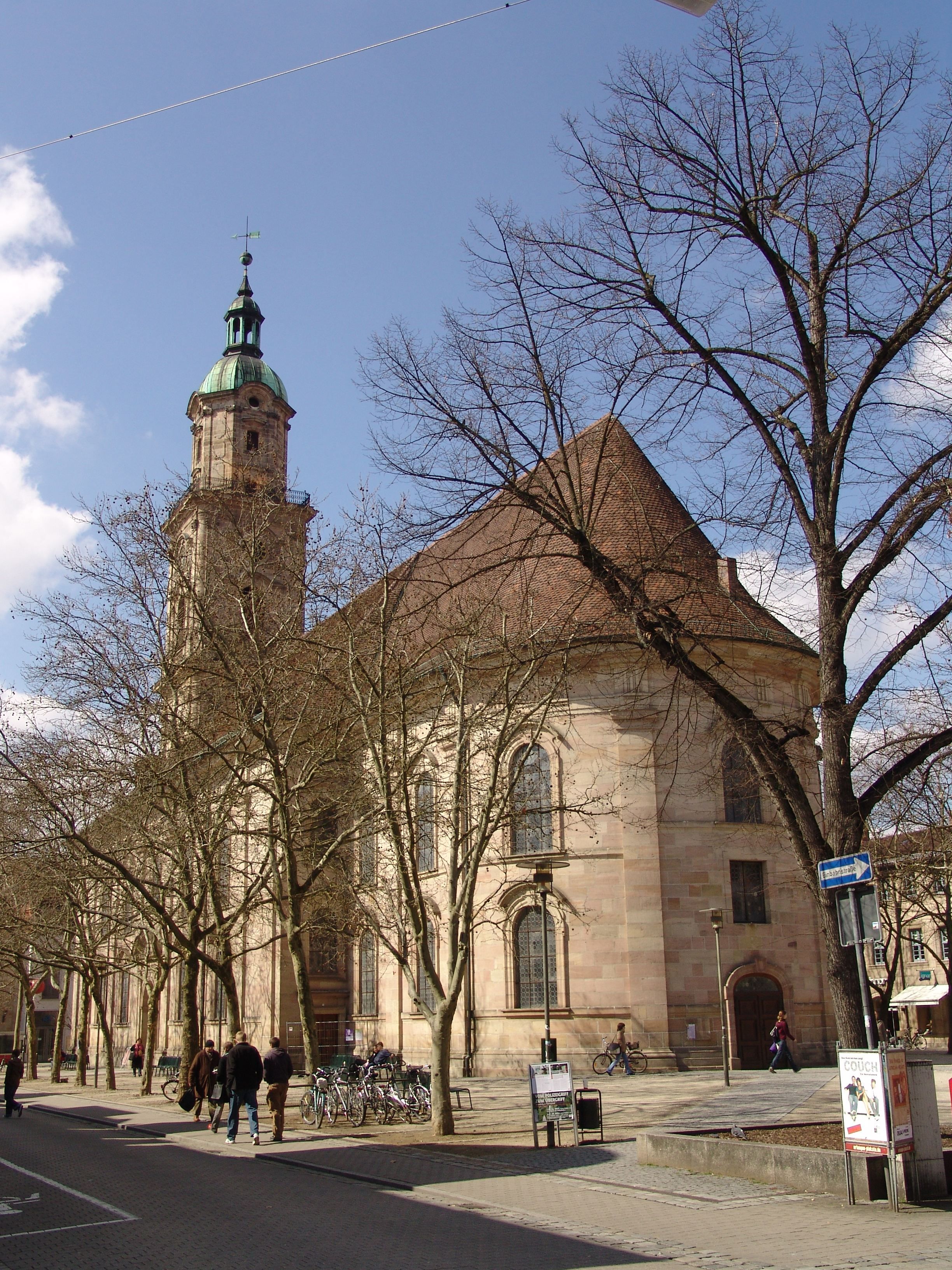 Neustädter Pfarrkirche (Erlangen)